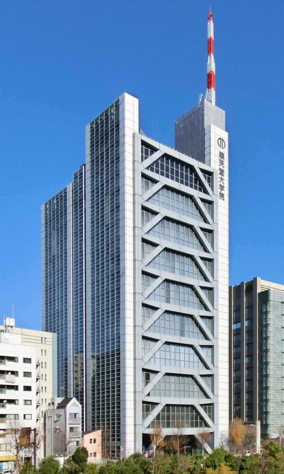 順天堂大学院 センチュリータワー